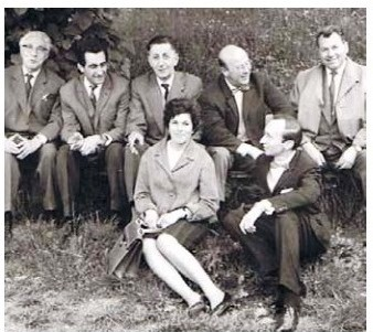 עליזה בחברת עיתונאים זרים בווינה